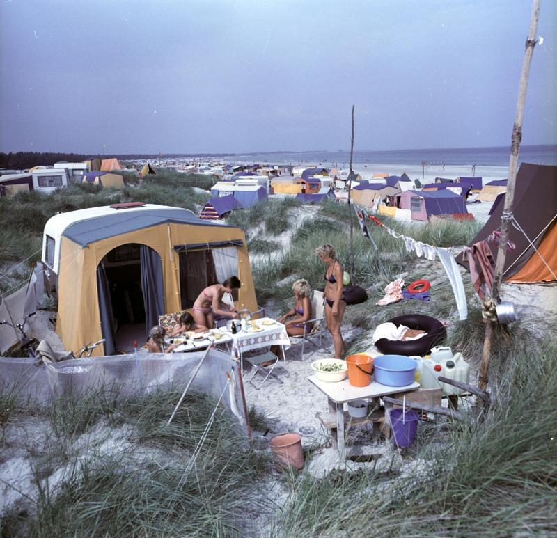 ADN/ZB/Sindermann/22.8.85/Bez. Rostock: Zu den schönsten Zeltplätzen an der Ostseeküste gehört Prerow auf dem Darß. Auf diesem Campingplatz ist es gestattet, die bunte "Leinwandvilla" direkt in den Dühnen aufzubauen.